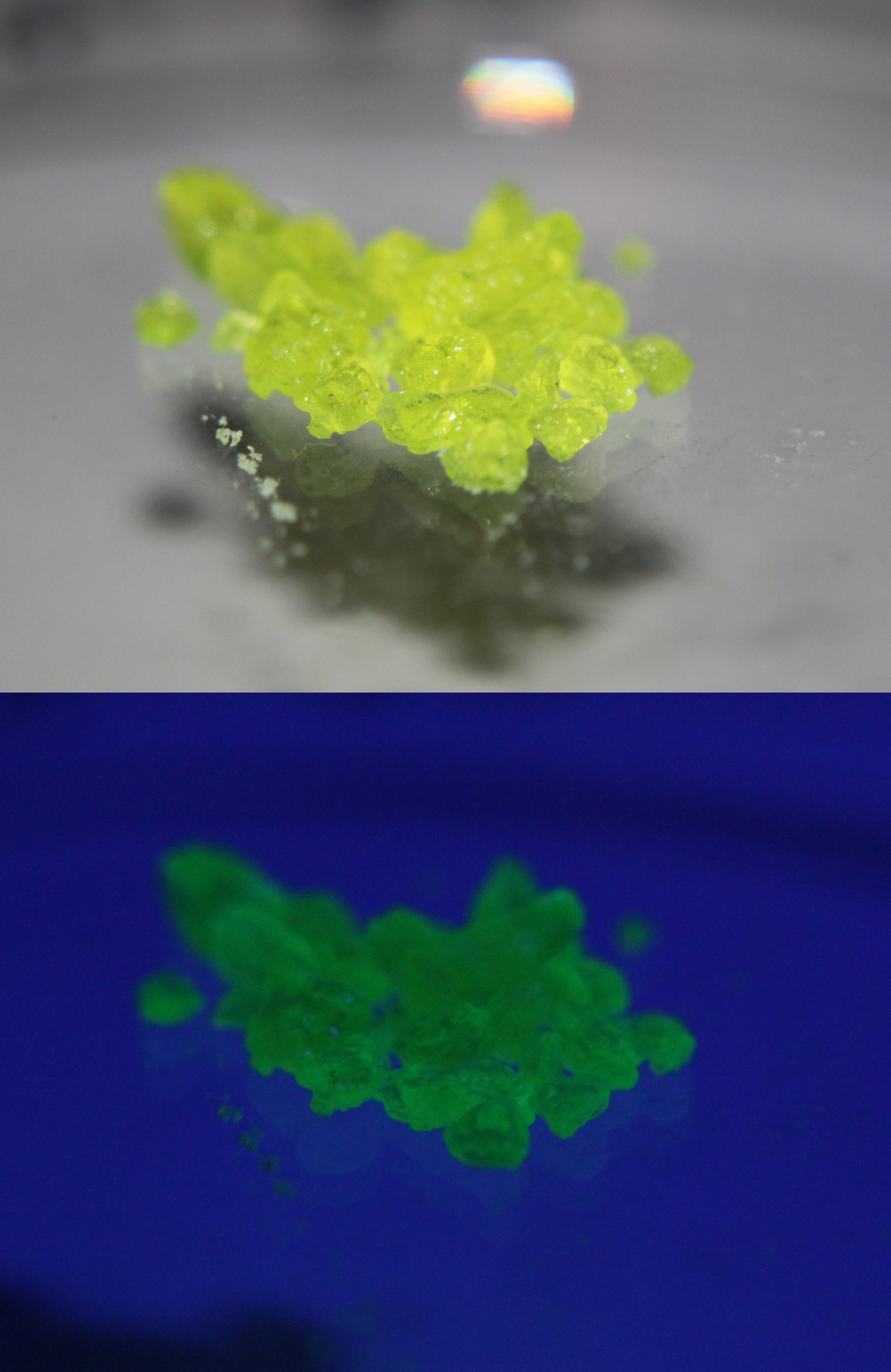 Uranylnitrat